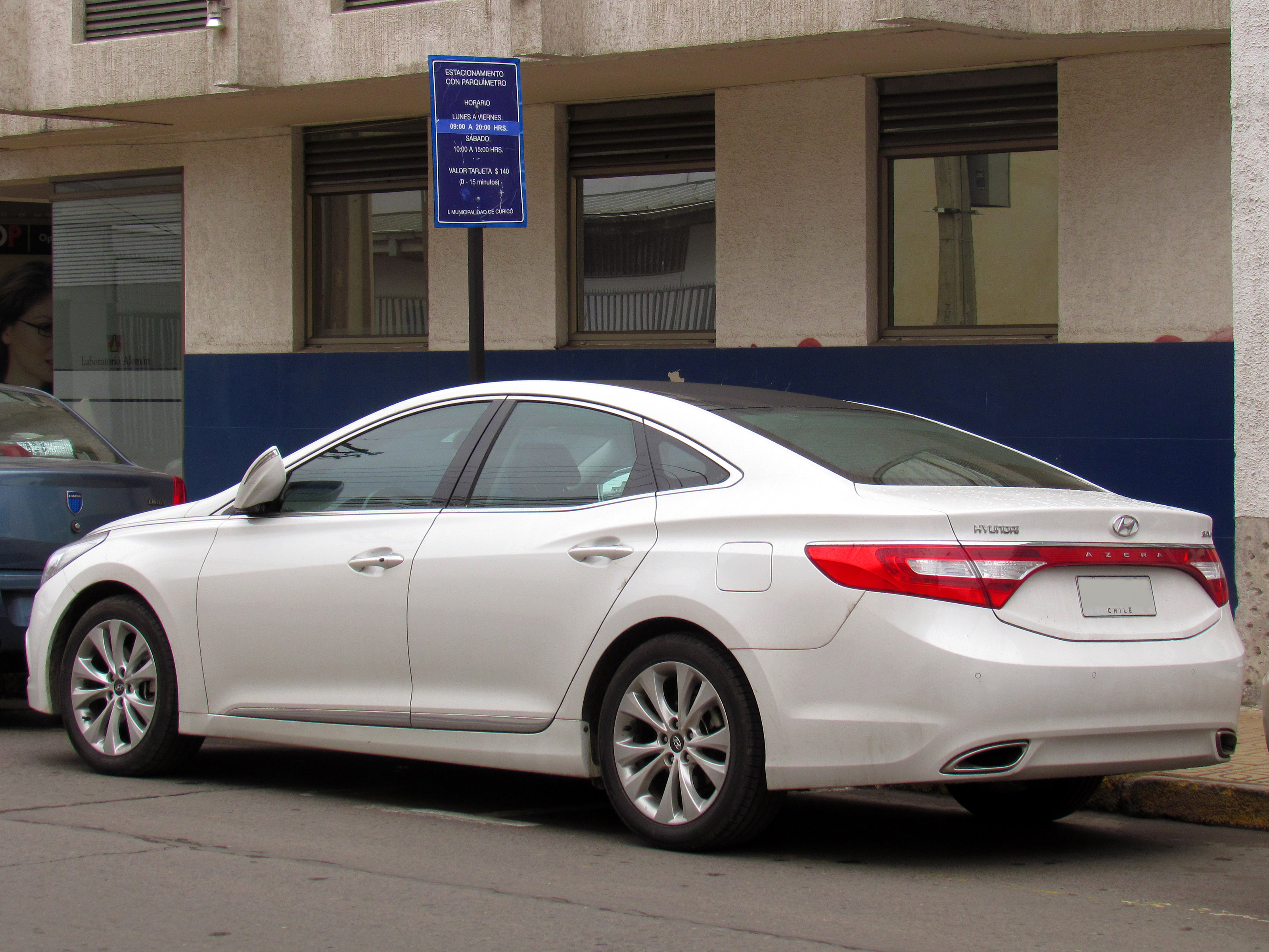 Hyundai Azera V6 GLS 2014